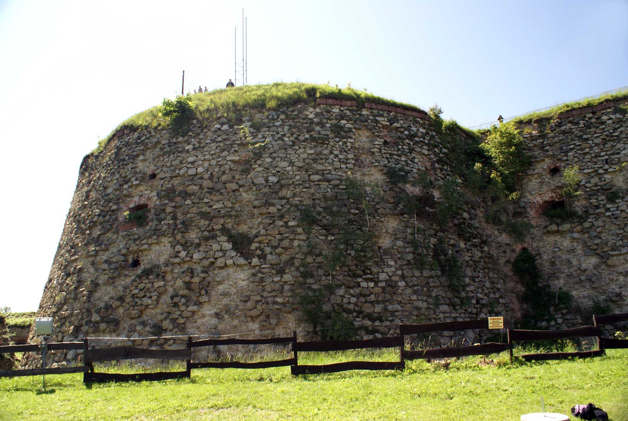 Srebrna Góra, Twierdza Srebrna Góra, 1765-1777